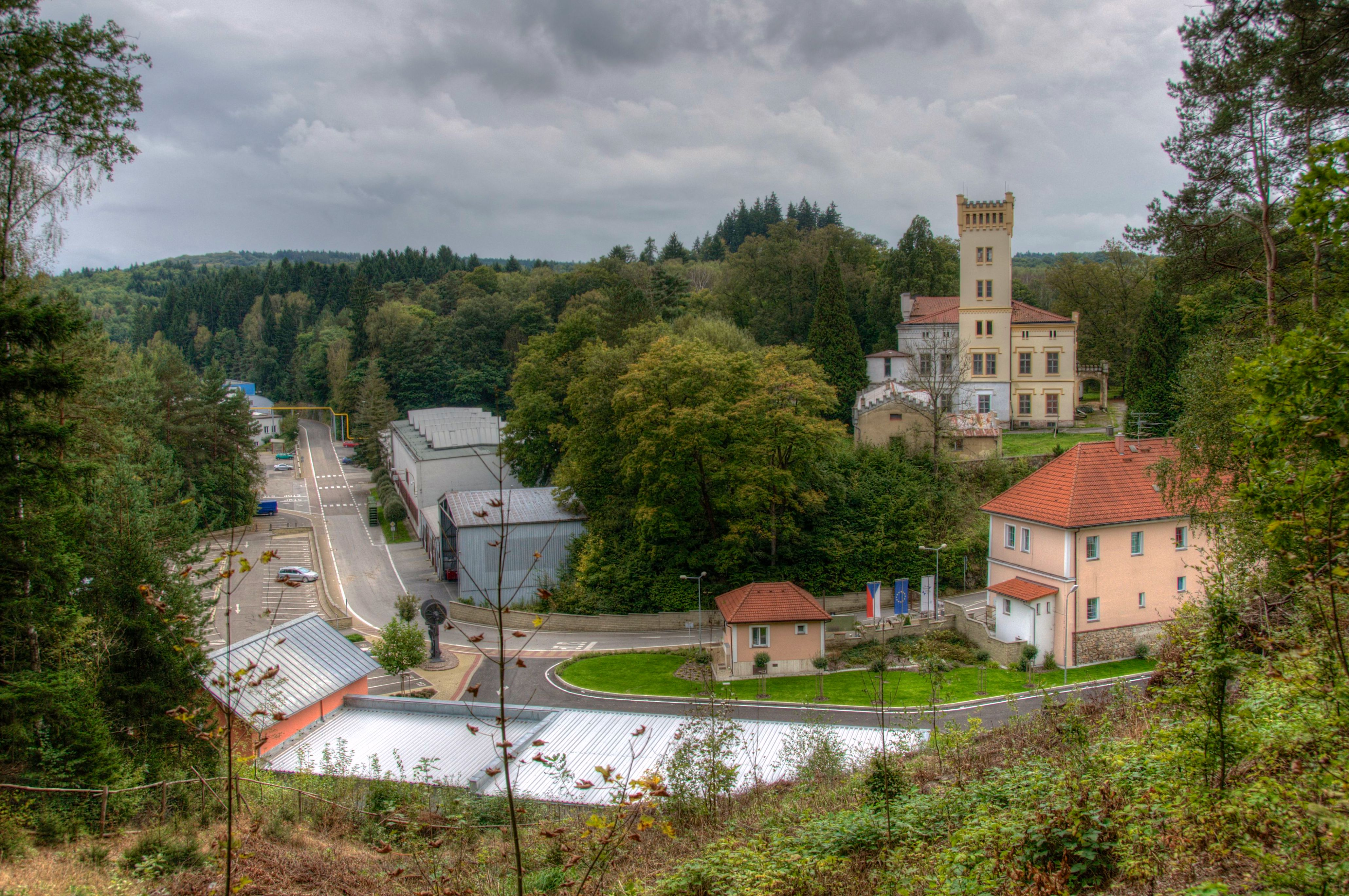 Kamenický zámek s továrnou Strojmetalu při pohledu od severovýchodu